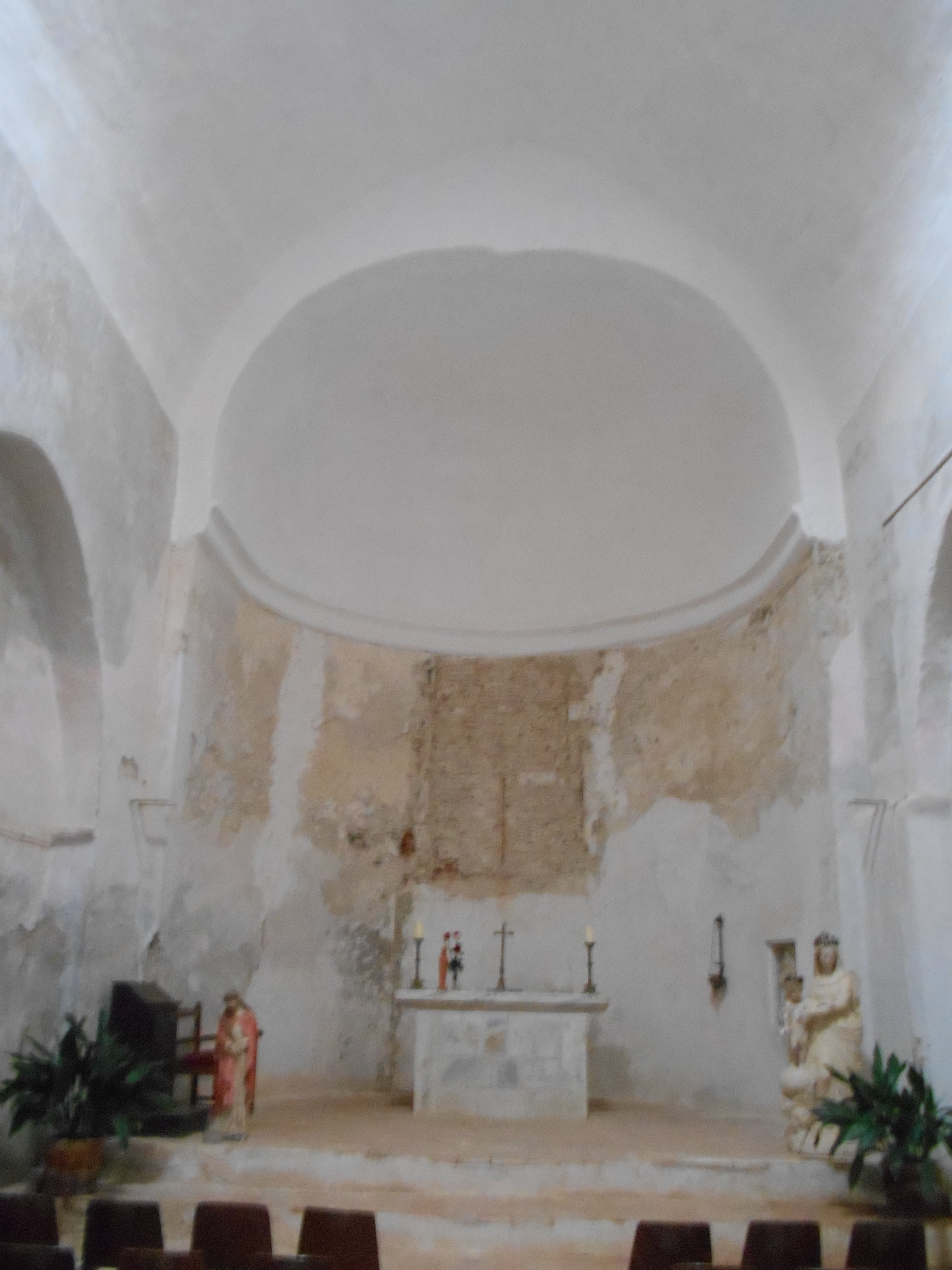 Interior de l'església de Santa Maria del Camp